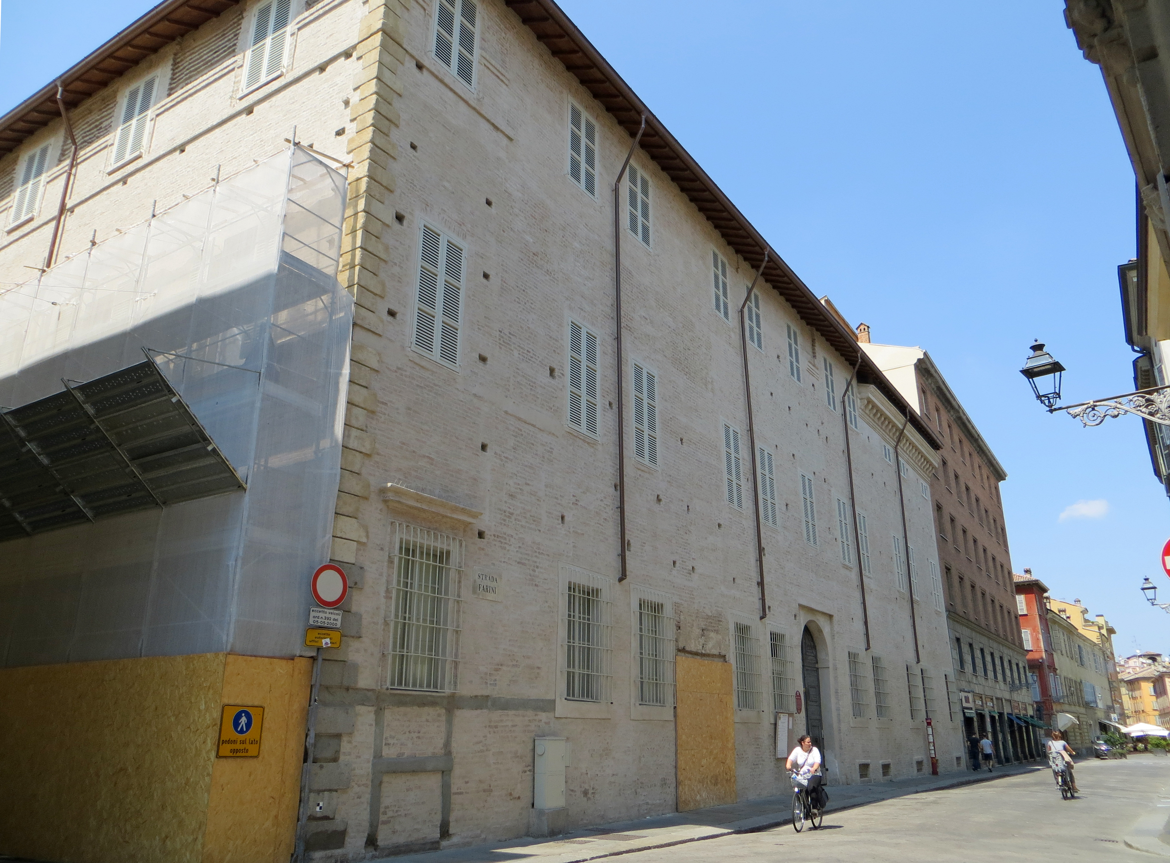 Palazzo Tarasconi (Parma) - facciata